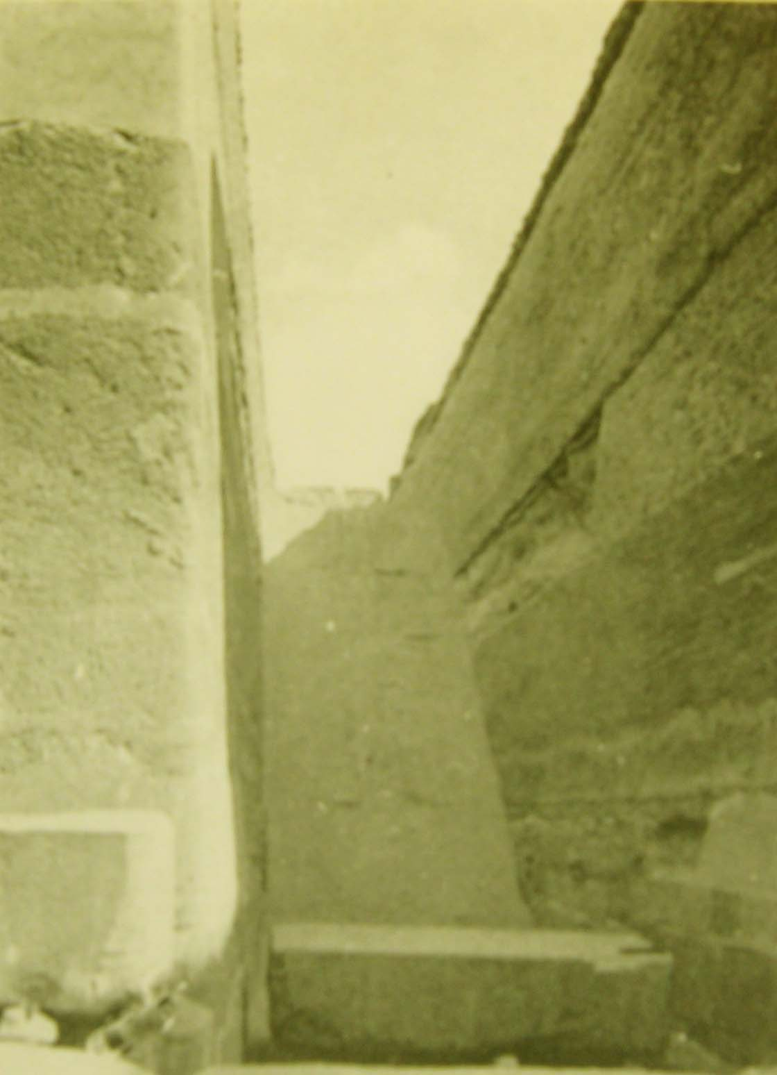 Photo de la grande excavation de Zaouiet el aryan.